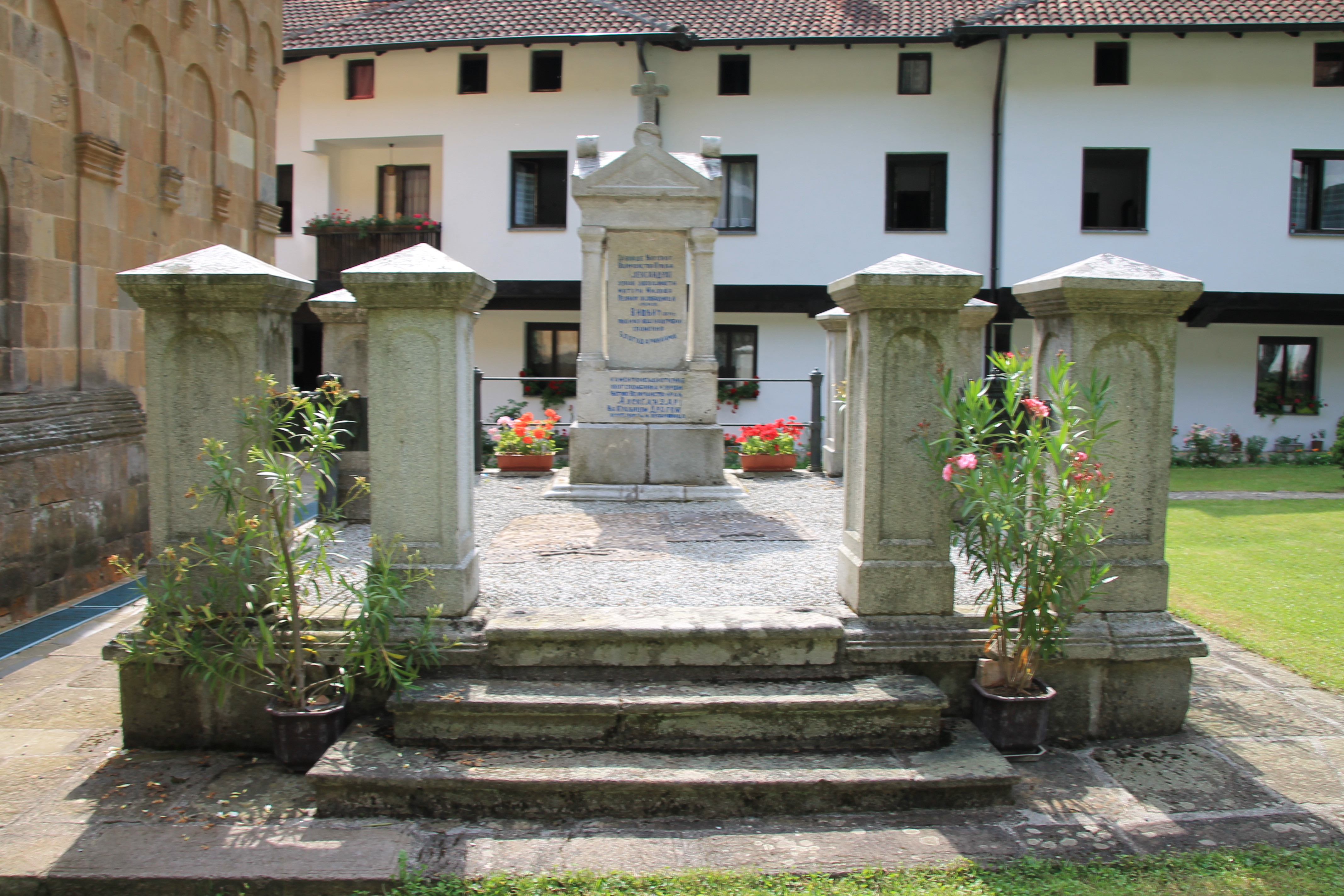 Manastir Vraćevšnica, 2019.